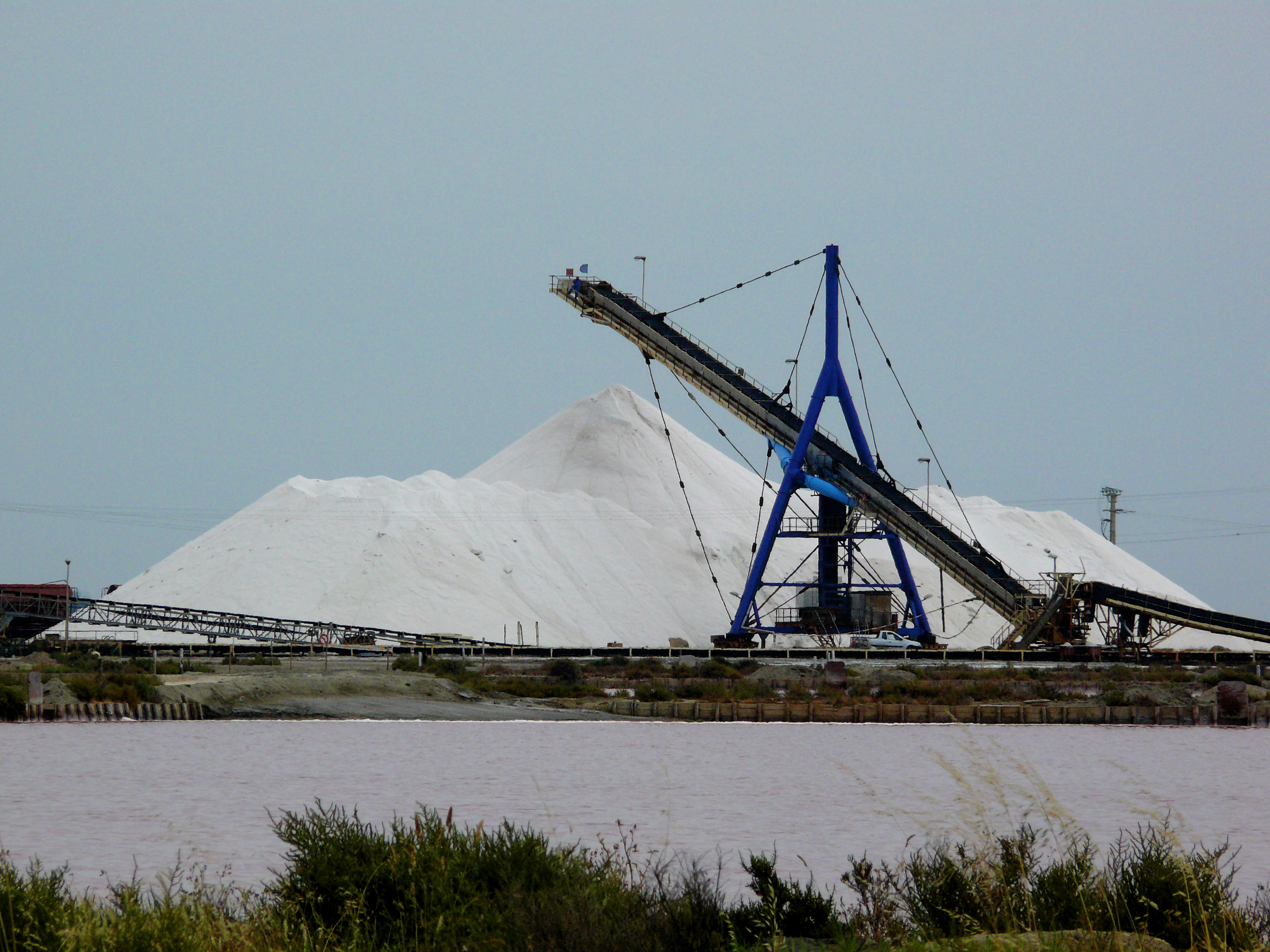 Salins de Camargue montrant la formation des camelles (montagne de sel) grâce à un élévateur muni du rouleau sans fin